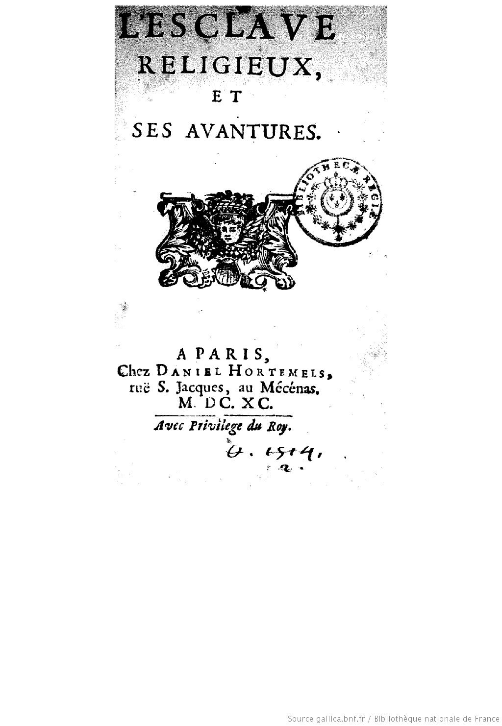 Titre : L'esclave religieux, et ses avantures Auteur : Quartier, Antoine (1632?-1702). Auteur du texte Éditeur : A Paris, chez Daniel Hortemels, ruë S. Jacques, au Mécénas. M. DC. XC. Date d'édition : 1690 Contributeur : Vitry, Madame de l'Hôpital (16..-16.. ; marquise de). Dédicataire Sujet : Esclavage -- Libye -- Tripoli (Libye) -- Ouvrages avant 1800 Type : monographie imprimée Langue : français Format : [24]-290 p. ; in-12 Format : Nombre total de vues : 313 Droits : domaine public Identifiant : ark:/12148/bpt6k104958t Source : Bibliothèque nationale de France, département Centre technique du livre, 8-Ln27-27359 Notice du catalogue : Provenance : Bibliothèque nationale de France Date de mise en ligne : 15/10/2007